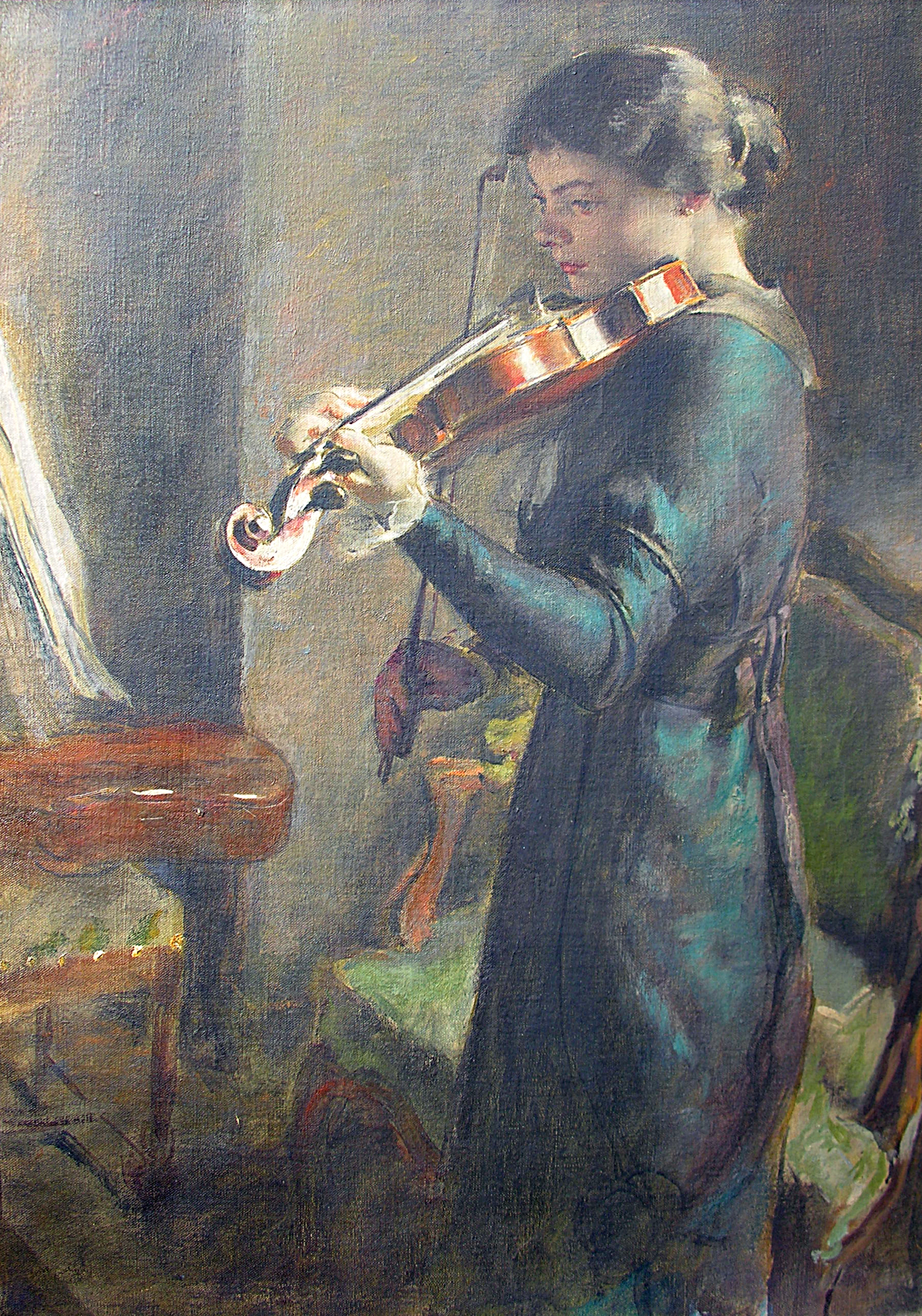 Jeune femme jouant du violon, localisation inconnue.